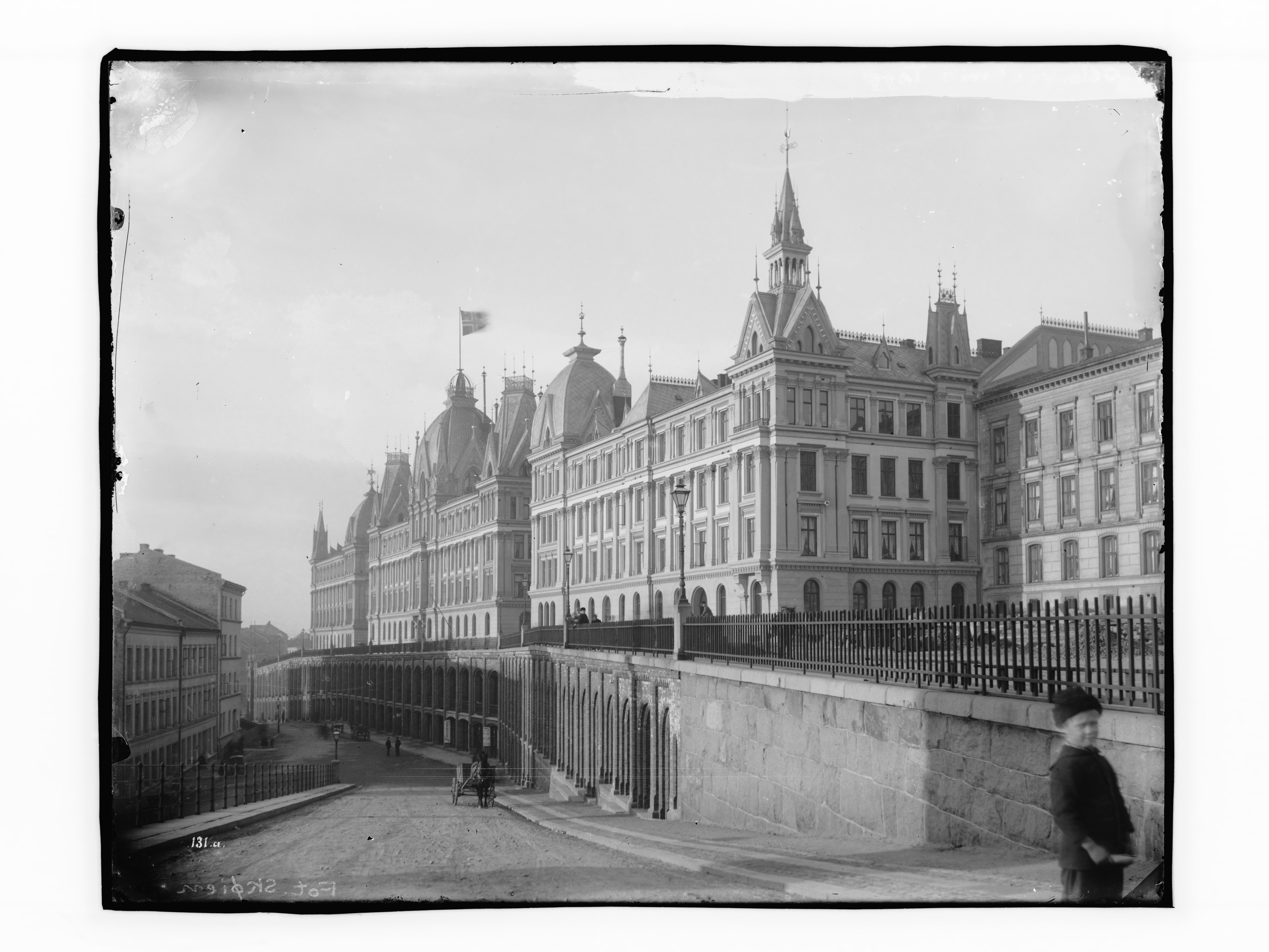 Påskrift negativ: 1. Oslo. Victoria Terr Fot.Skøien [Riksantikvaren] Påskrift konvolutt: B-1 Oslo. Victoria terasse [Riksantikvaren] Sted: Sentrum Kommune: Oslo Fylke: Oslo Tagger: Victoria terrasse fasade